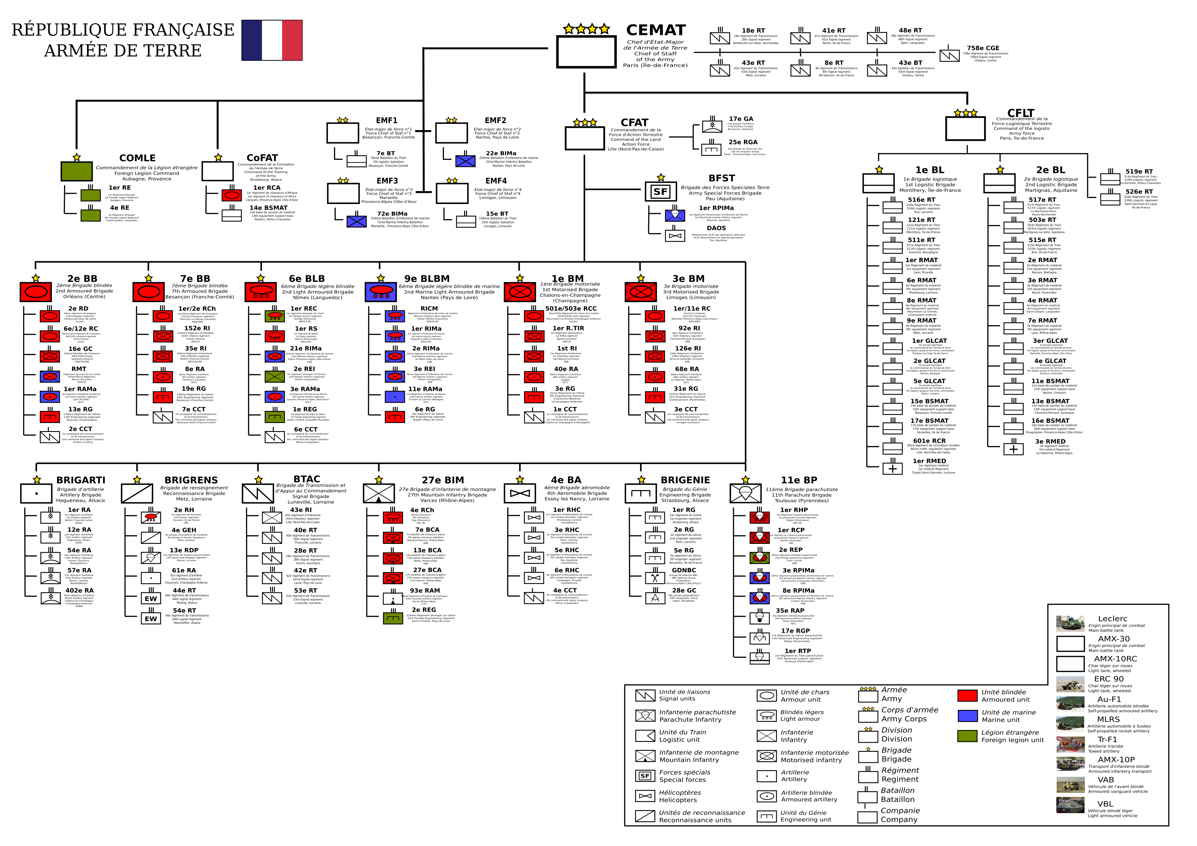 PNG version of Image:Armee_de_Terre_organigramme.svg